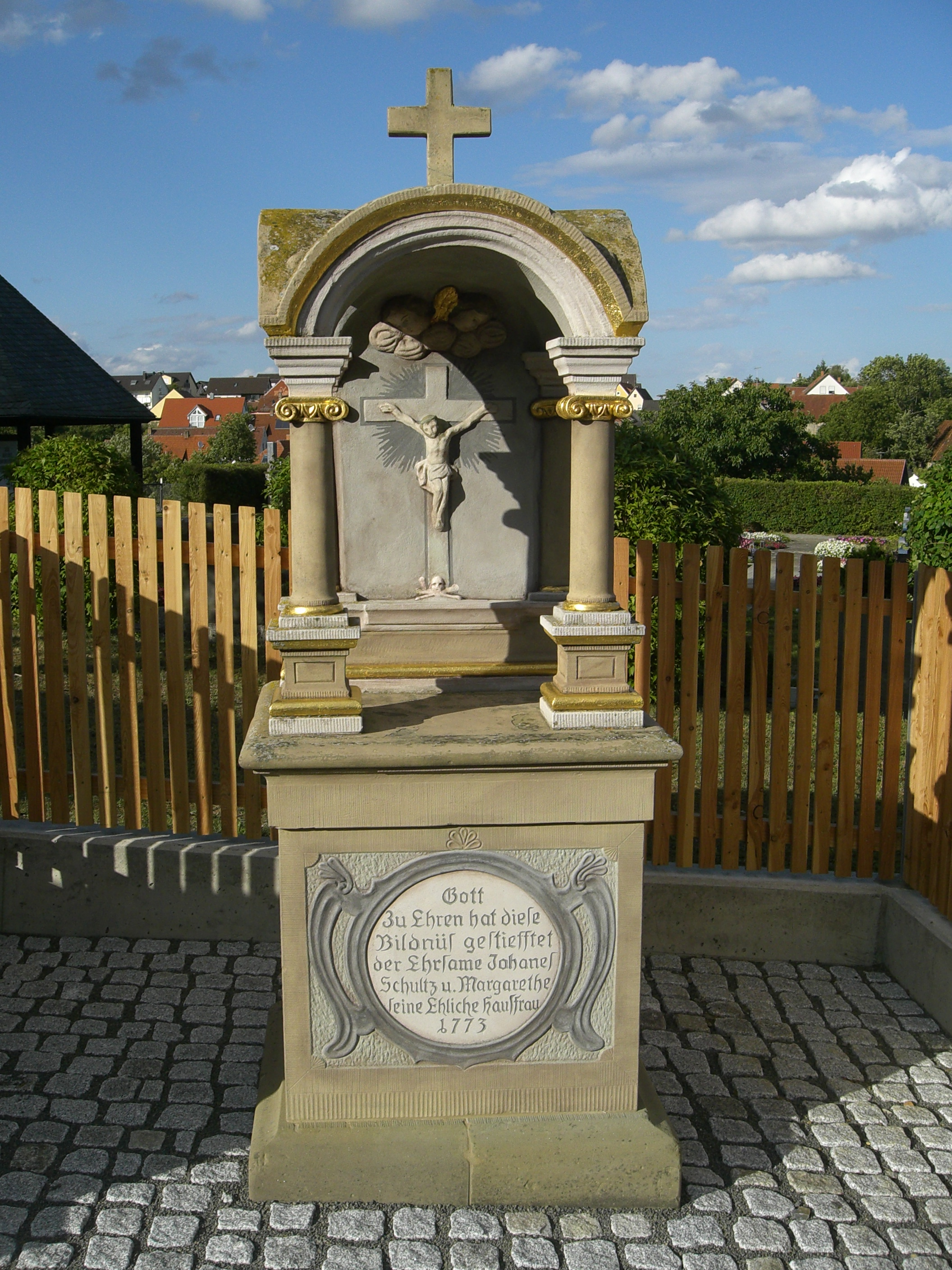 Bildstock am Friedhof in Greßthal